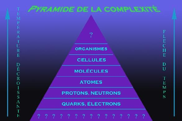 Créée à partir de File:Pyramidedelacomplexite.jpg.